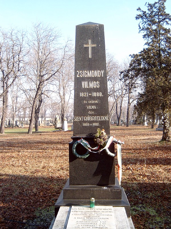 Zsigmondy Vilmos sírja Budapesten. Kerepesi temető: 18-1-18.